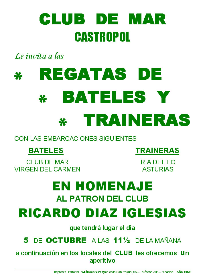 Reproducción en procesador de texto de cartel de regatas de 1969.